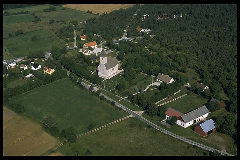 Motiv: Endre kyrka Nyckelord: Flygbilder, Riksintressen Kategori: KyrkomiljöEndre kyrka